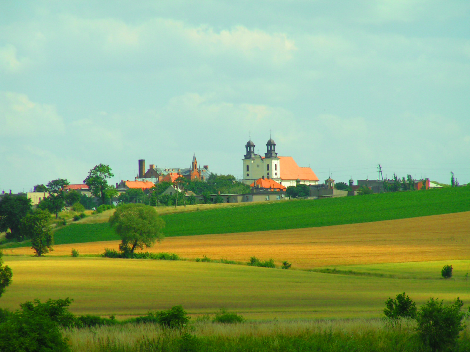 Panorama Kcyni